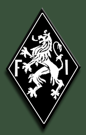 Ecusson du Front de l'Indépendance, mouvement de la résistance belge durant la seconde guerre mondiale